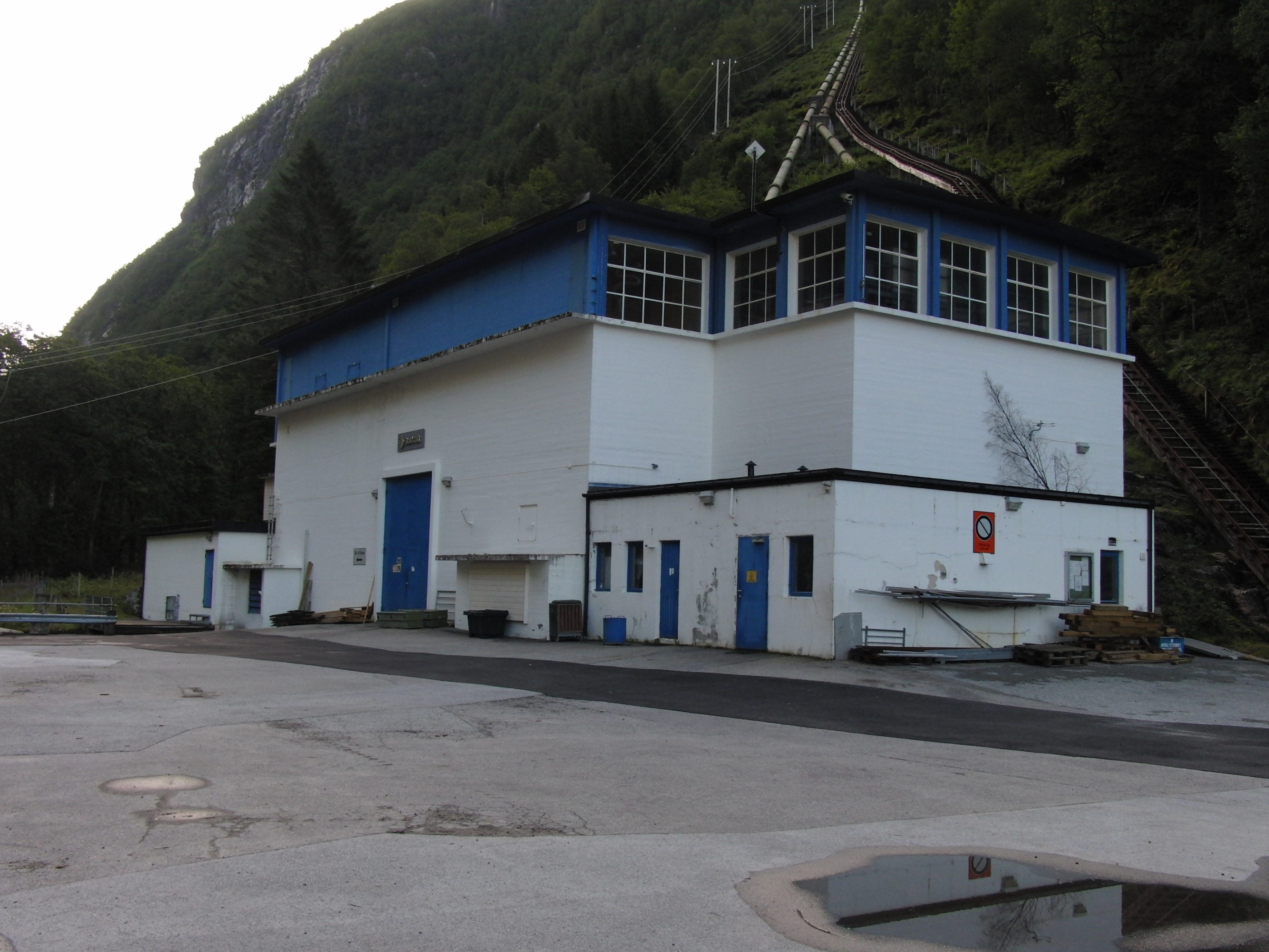 Høyanger K2 kraftverk